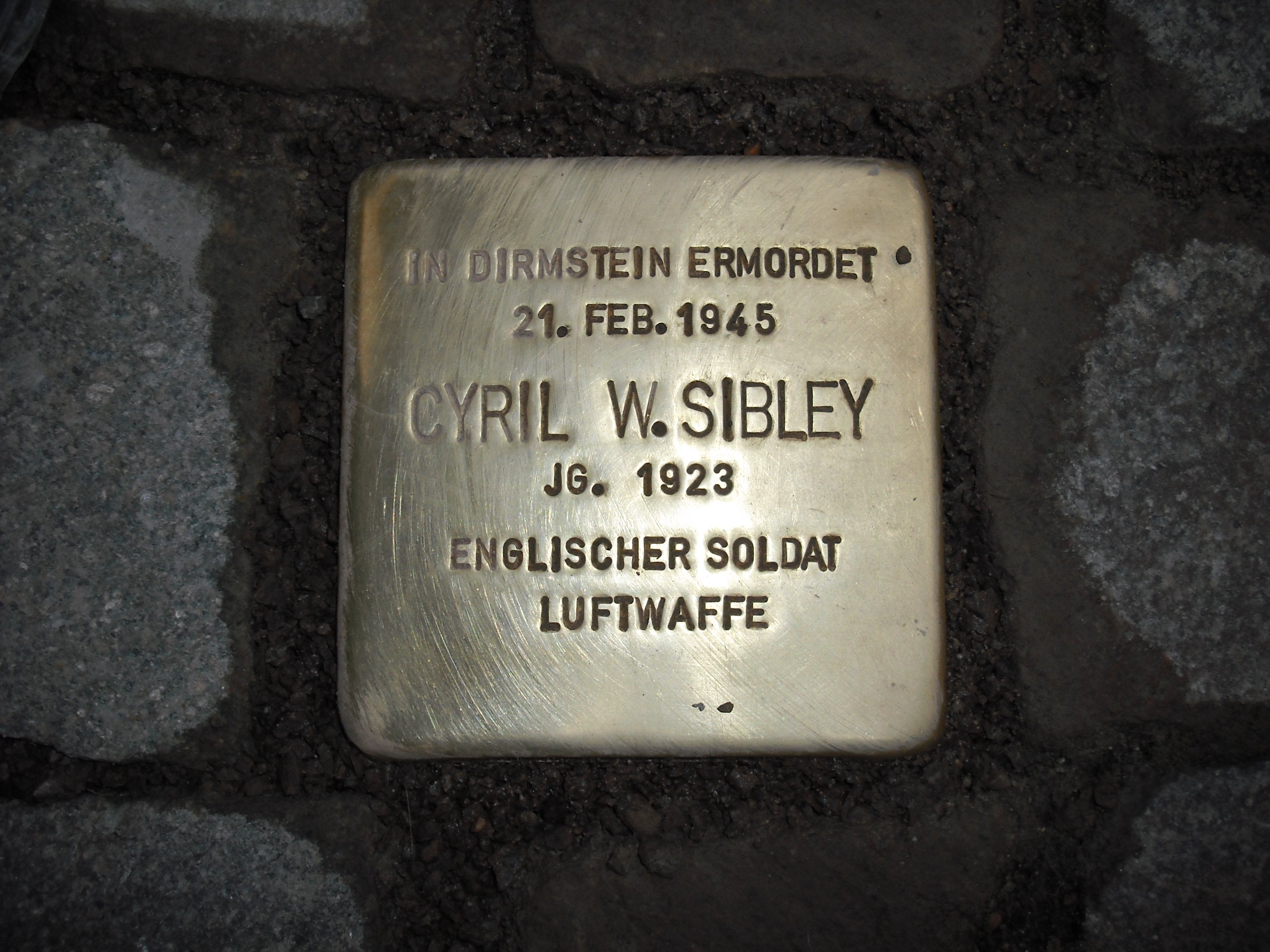 Am 27. März 2009 verlegter Stolperstein für den britischen Luftwaffenangehörigen Cyril William Sibley, ermordet am 21. Februar 1945 in Dirmstein durch den Ortsgruppenleiter Adolf Wolfert